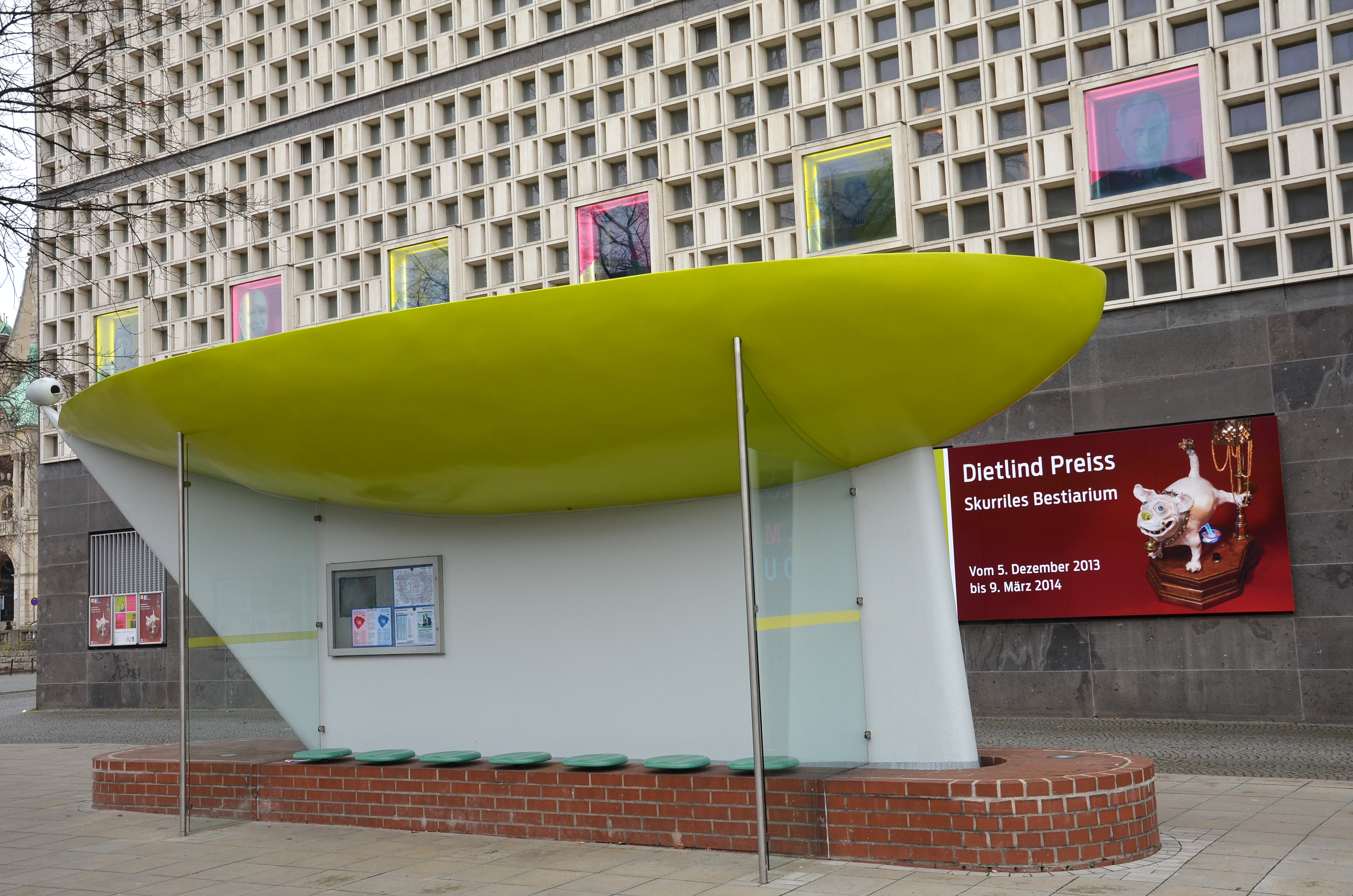 Hinter dem von Massimo Iosa Ghini entworfenen BUSSTOP wirbt ein pinkelnder Mops grinsend für die Ausstellung Skurriles Bestiarium der Künstlerin Dietlind Preiss im Museum August Kestner bis 9. März 2014 ...